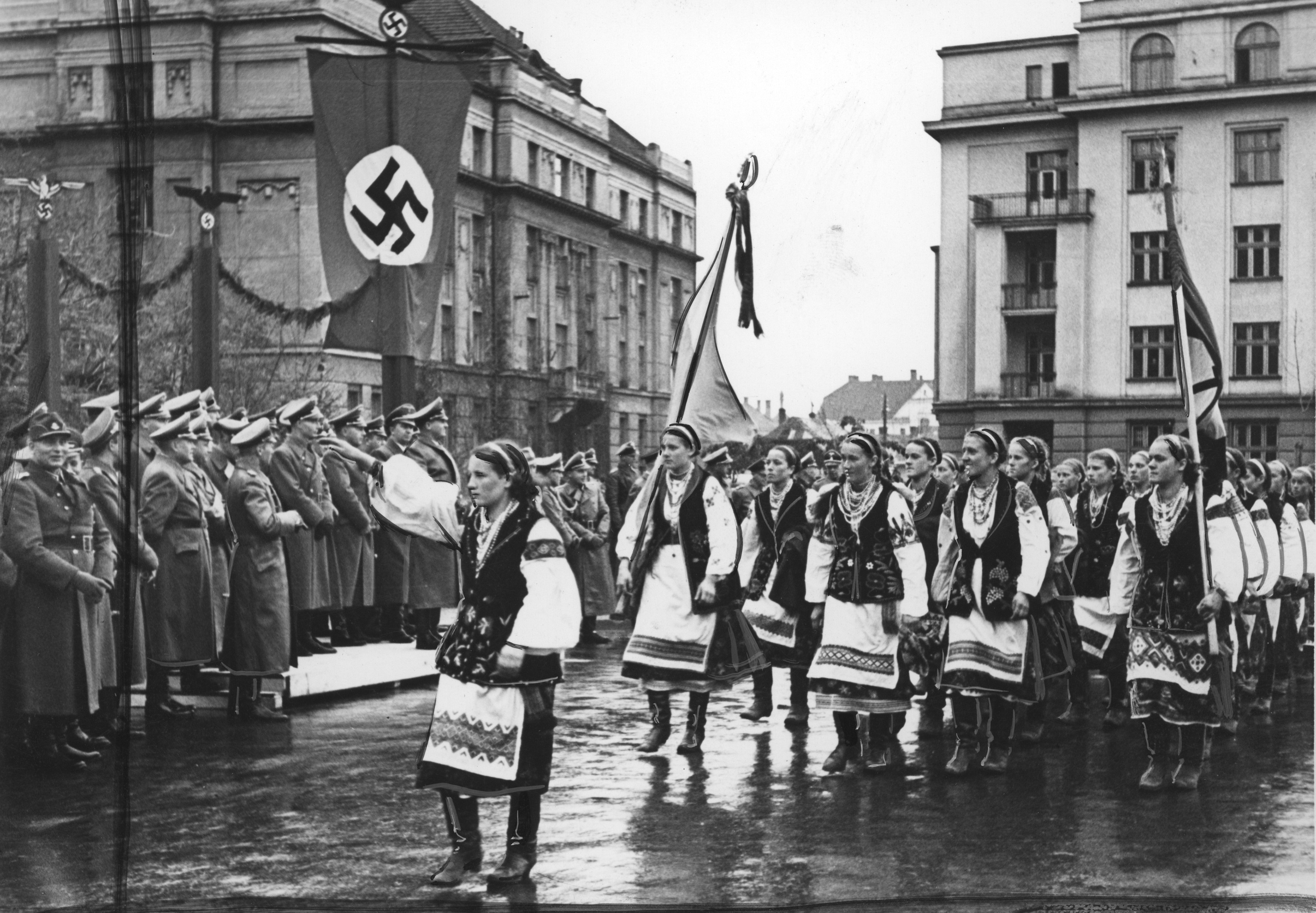 арад в Станиславе (Ивано-Франковск) в честь визита генерал-губернатора Польши рейхсляйтера Ганса Франка